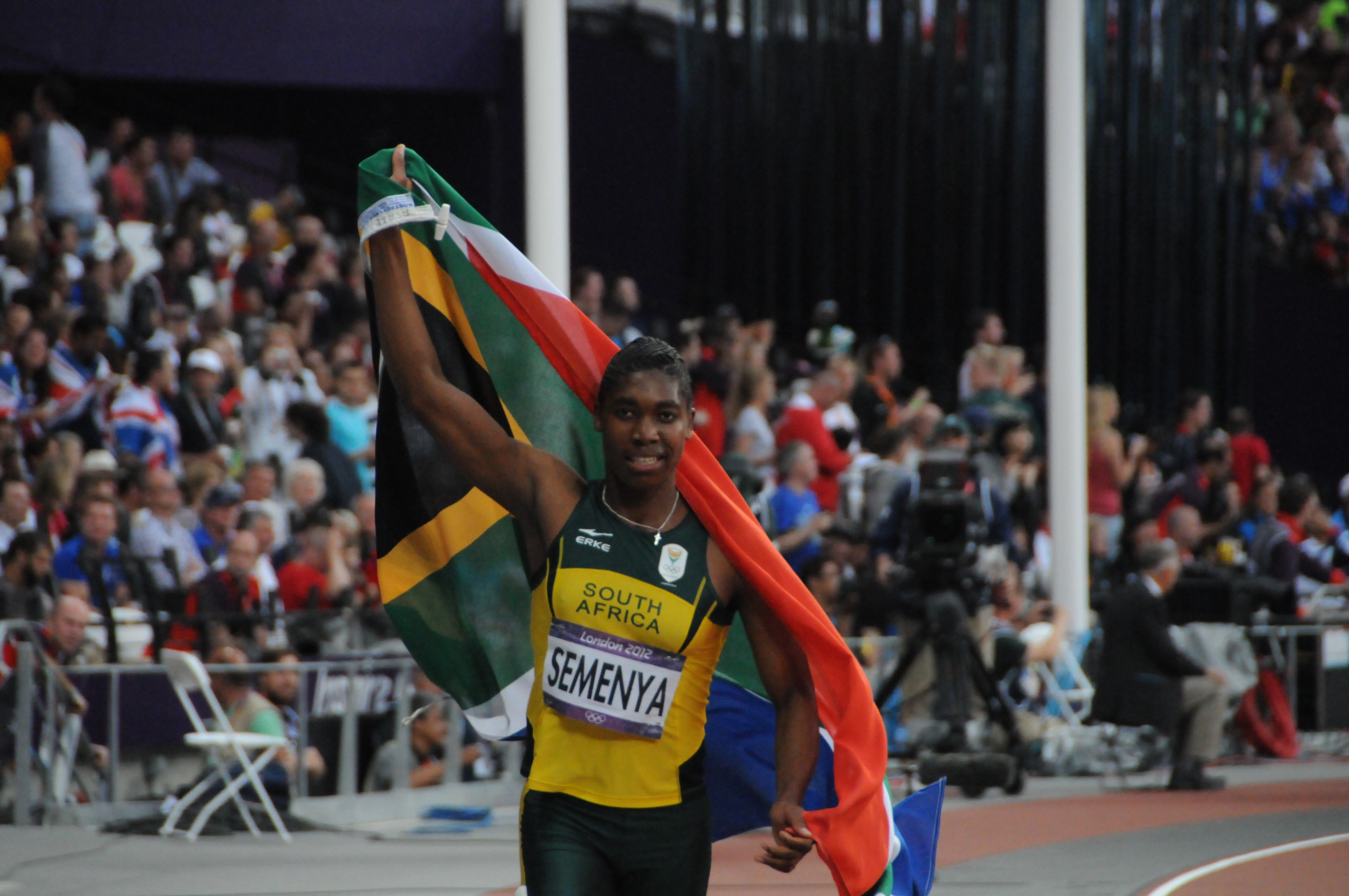 La sud africaine: Caster Semenya, médaille d'argent aux 800m